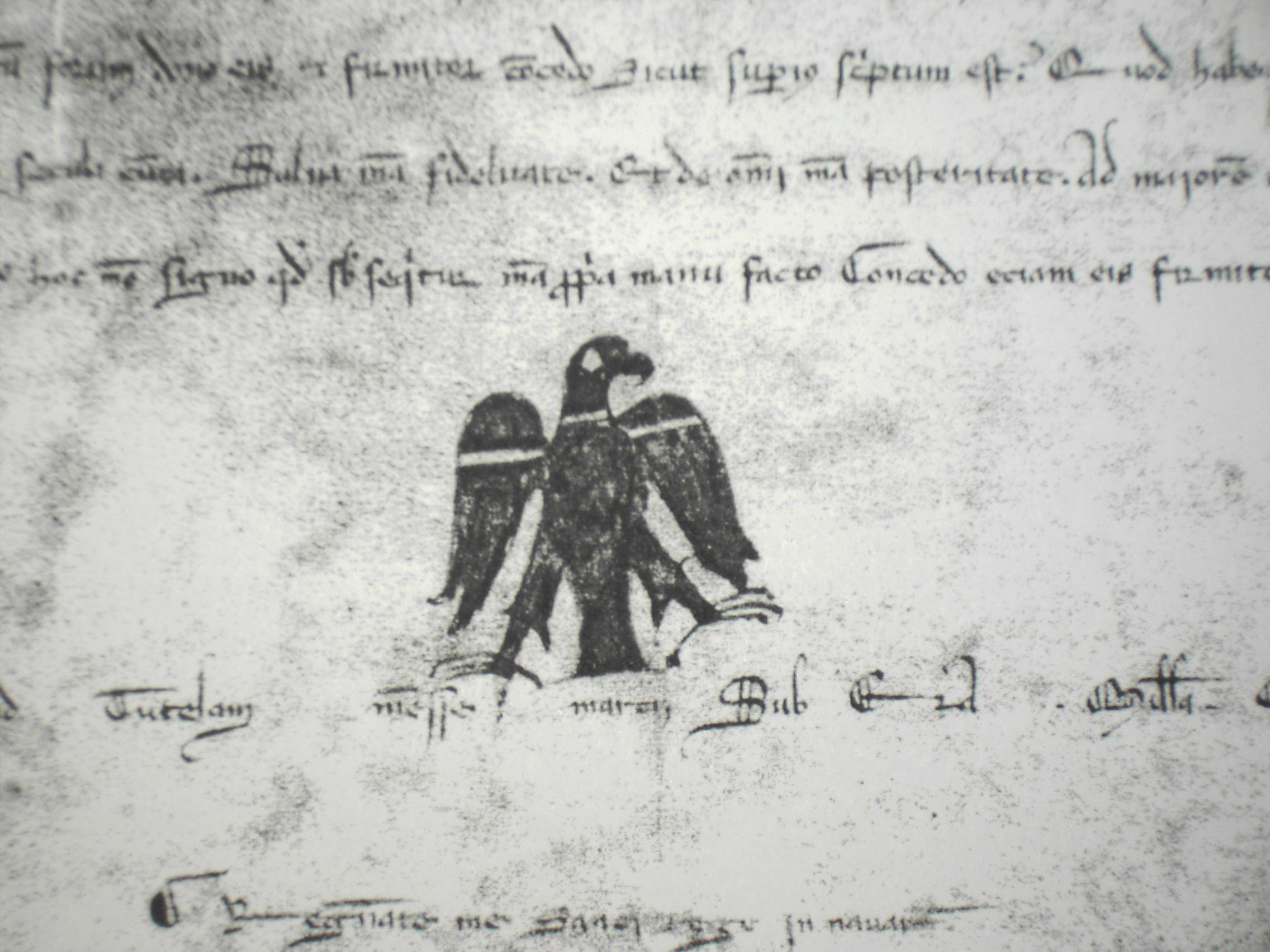 Sello del rey de Navarra. Sancho VIIth signature